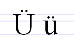 Łacińska litera Ü.